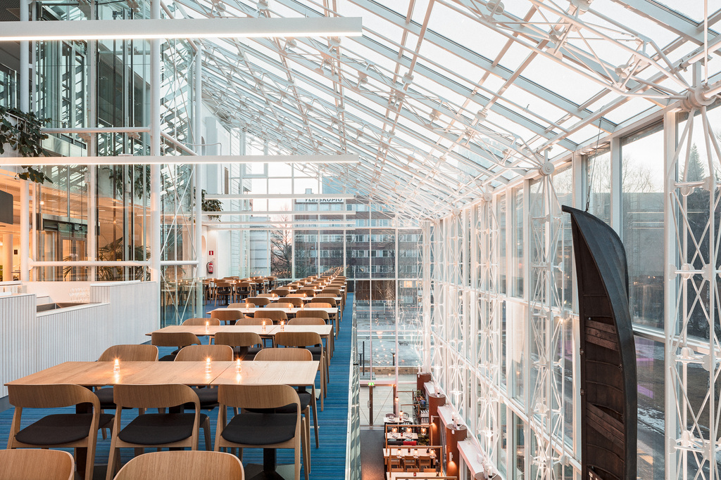 Tampere Hall